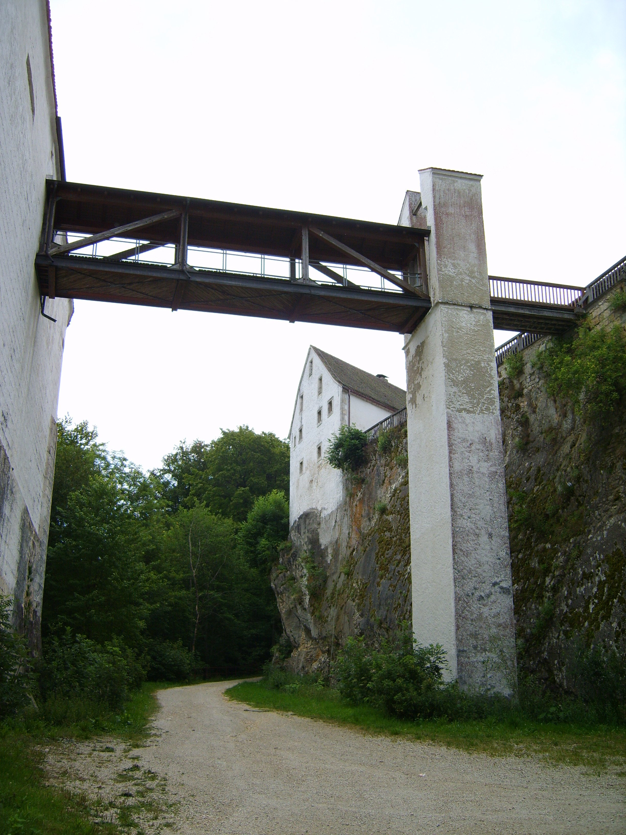 Burg Wildenstein Burg Wildenstein: Burggraben - Google Maps - Google Earth